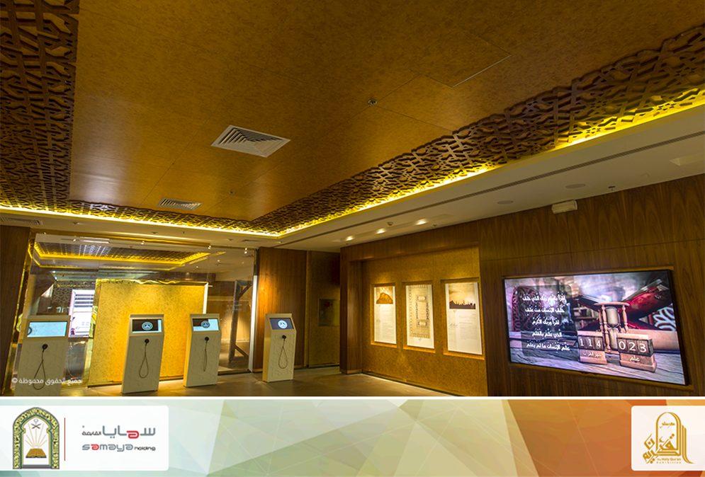 صورة من قاعة ورتل القرآن ترتيلا